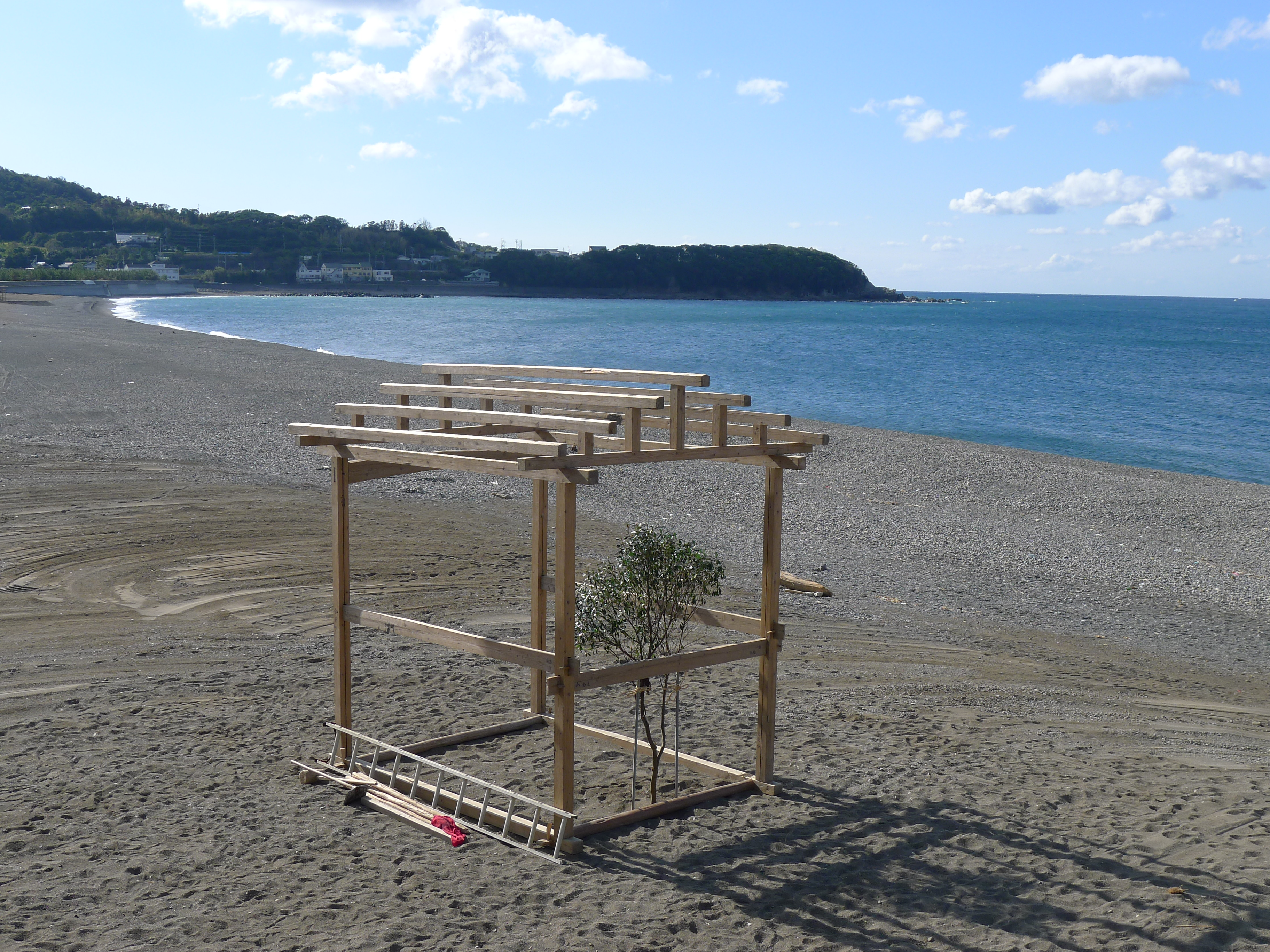 切目川河口の切目海岸（和歌山県印南町）。秋の祭礼で海神を迎え入れるための準備として仮設の祠が造られ、榊が祀られた。